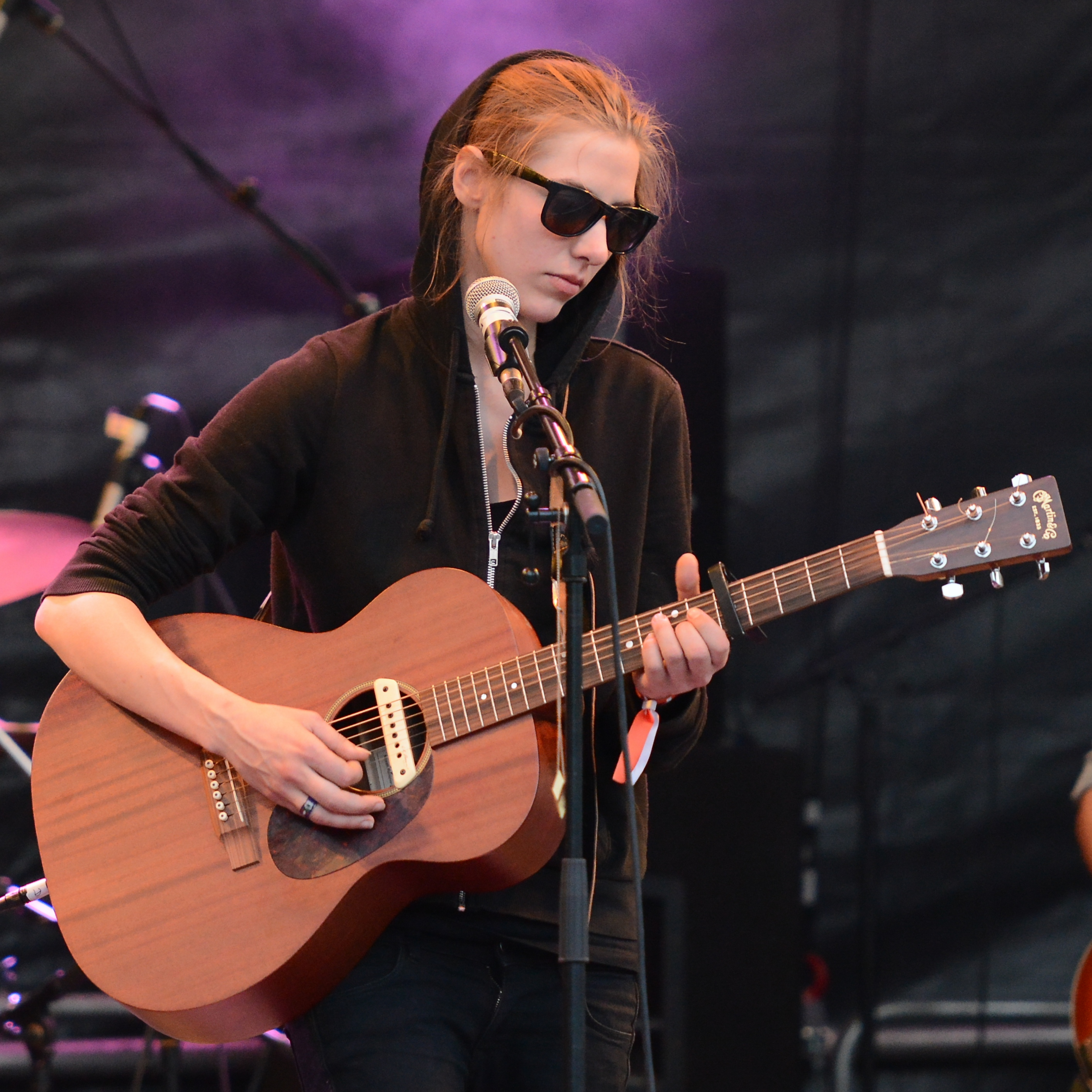 Desiree Klaeukens beim Traumzeit-Festival 2014